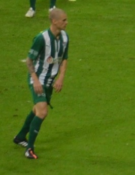 Holmen Bursaspor